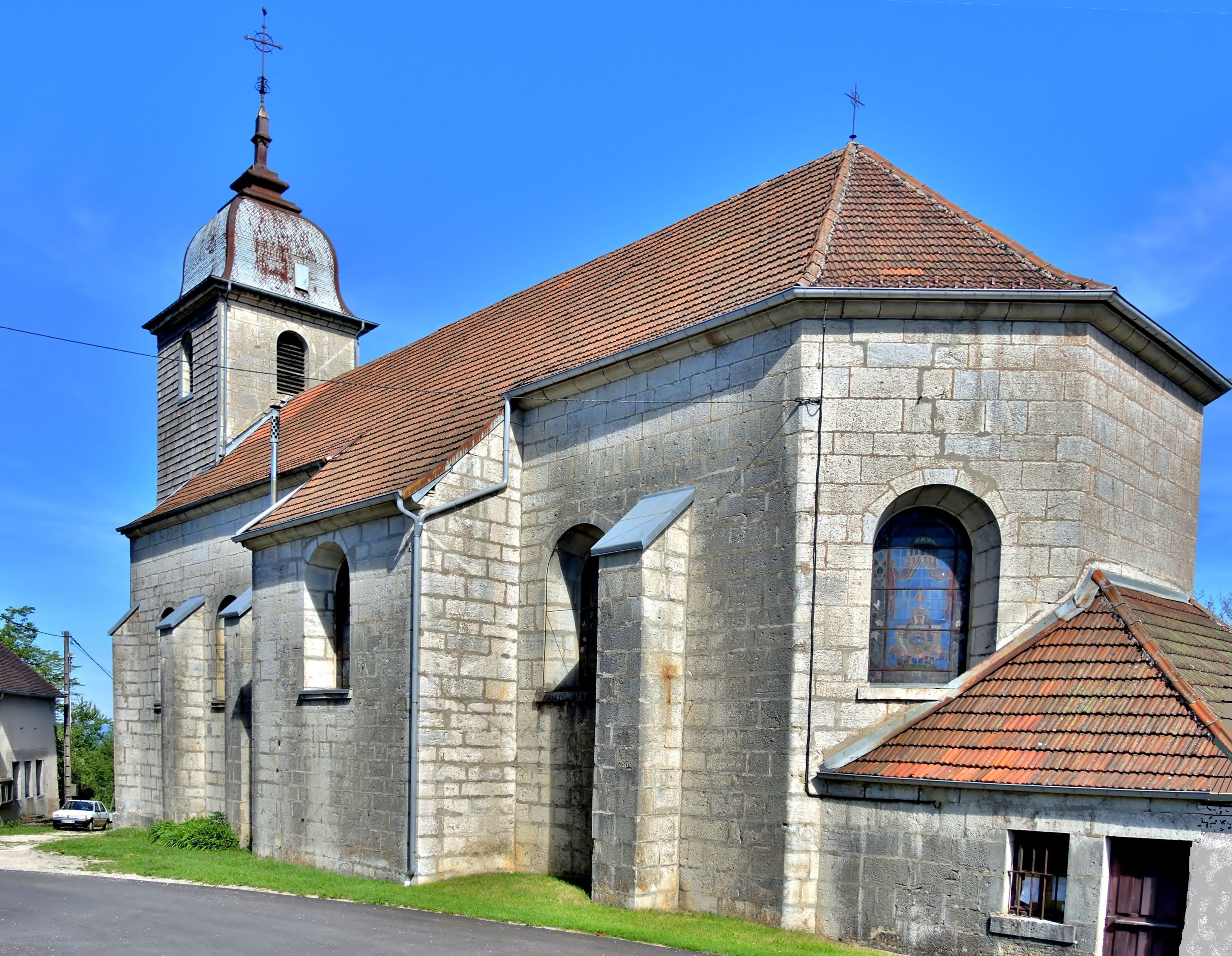 Eglise Sainte Antide, à Passavant. Doubs